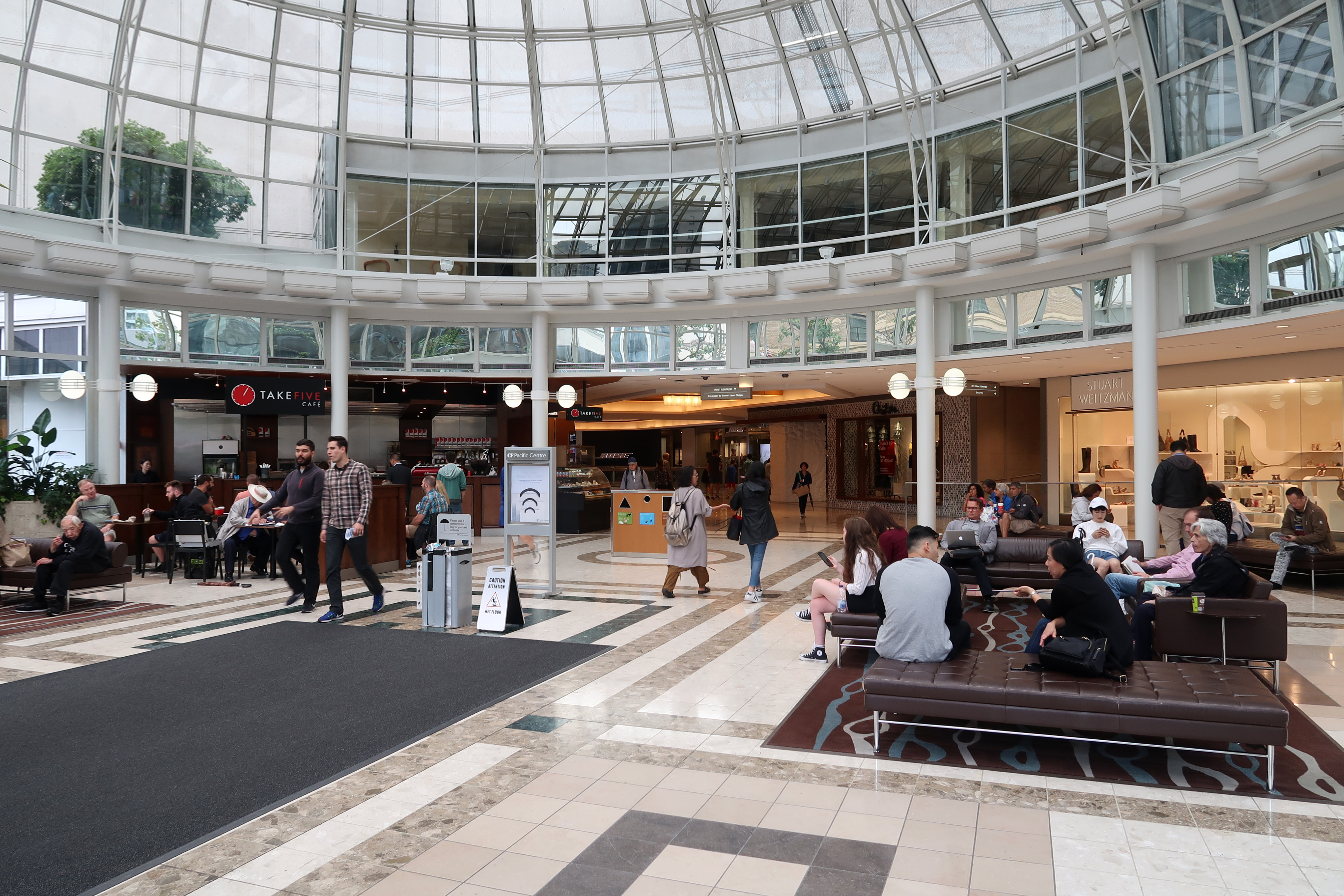 CF Pacific Centre Georgia Street Entrance